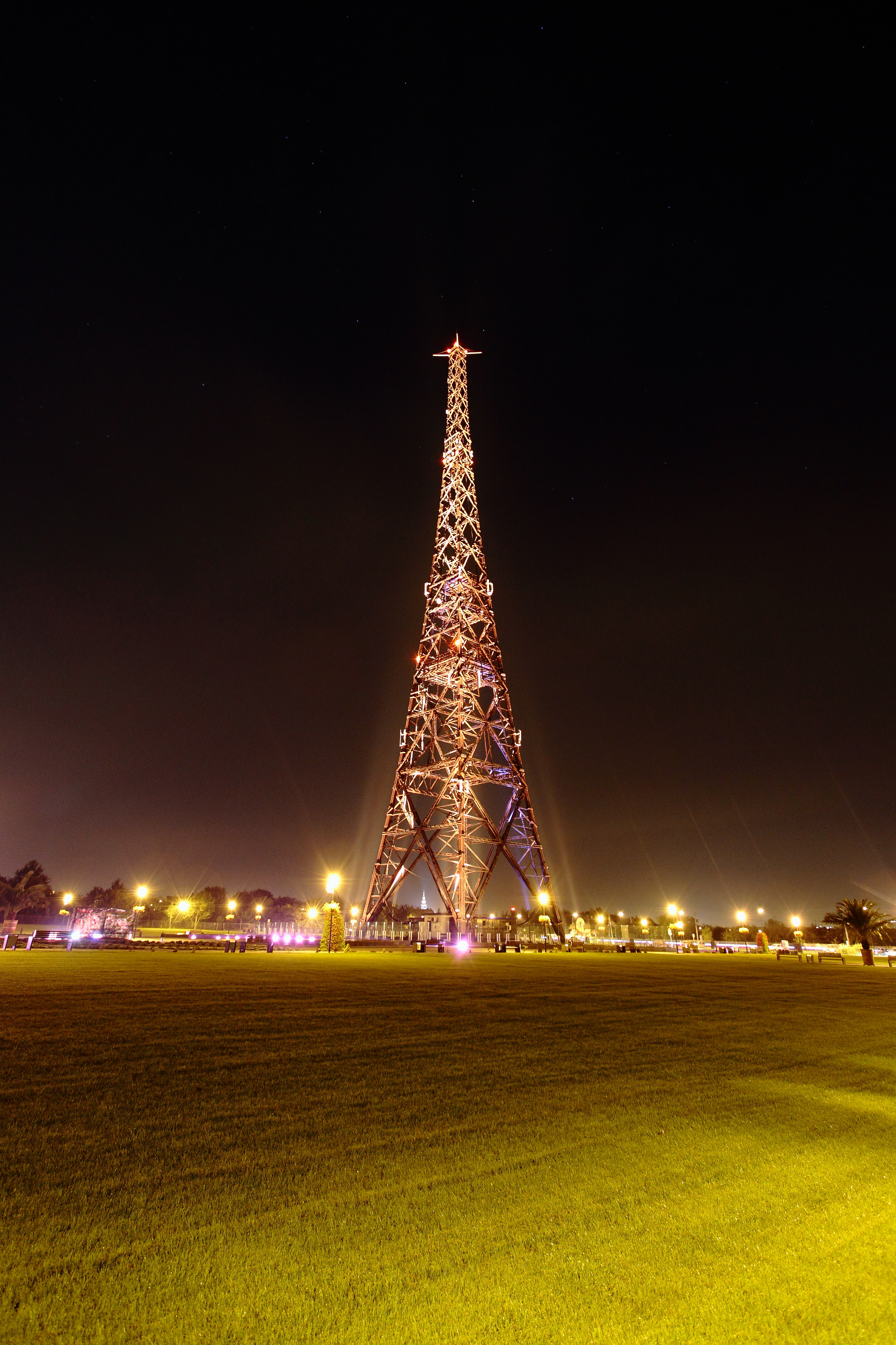 Radiostacja Gliwice to jeden z najbardziej rozpoznawalnych obiektów Gliwic. Charakterystyczna wieża antenowa stanowi część zbudowanego w połowie lat trzydziestych XX wieku kompleksu radiowej stacji nadawczej.